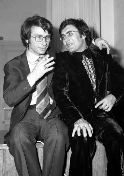 Al Bano e Nicola Di Bari al Festival di Sanremo 1974